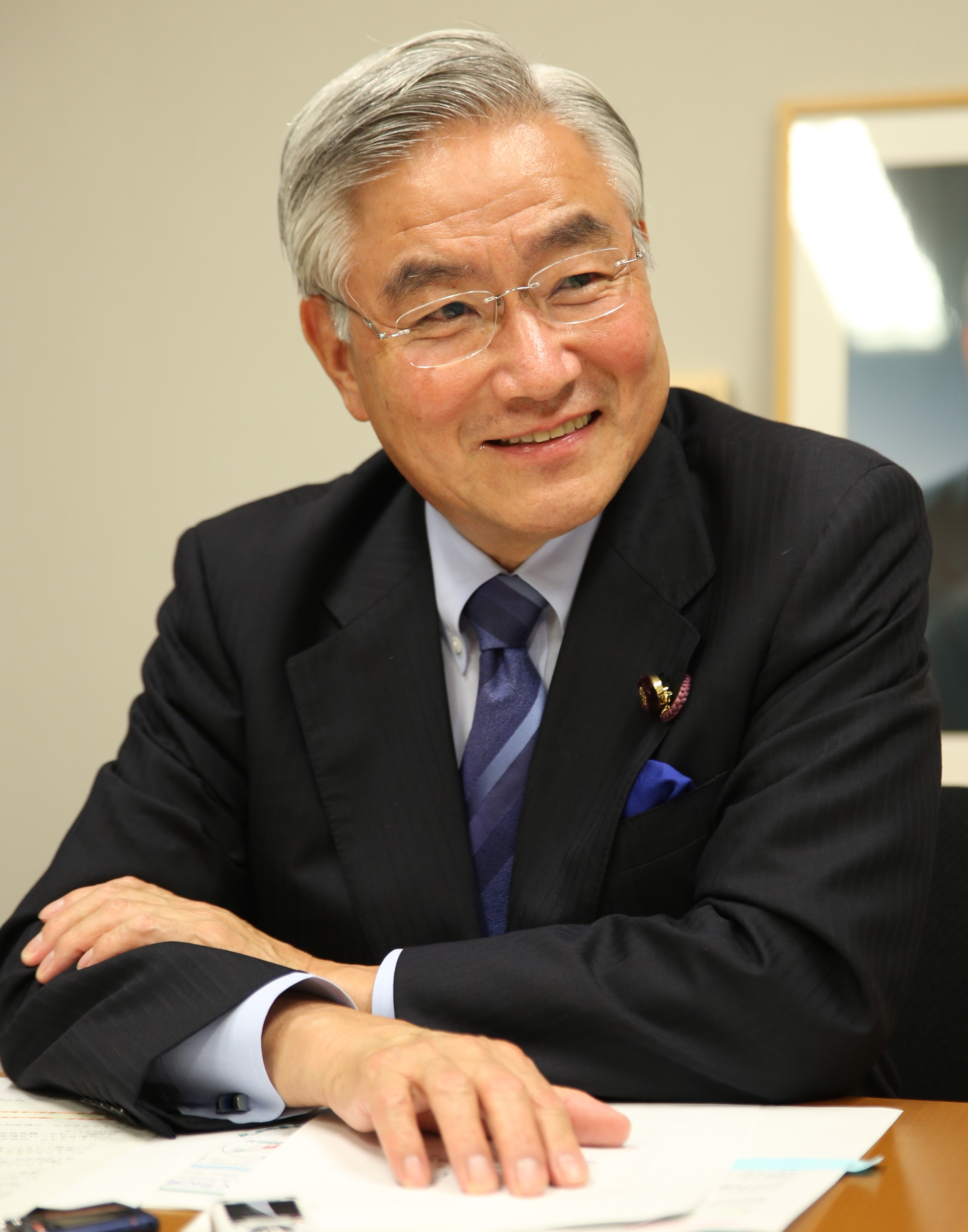 2015年8月12日 東京都千代田区にて